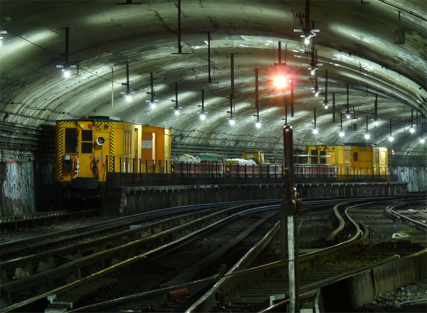 Le convoi S encadré par deux tracteurs Sprague à Charenton-Ecoles